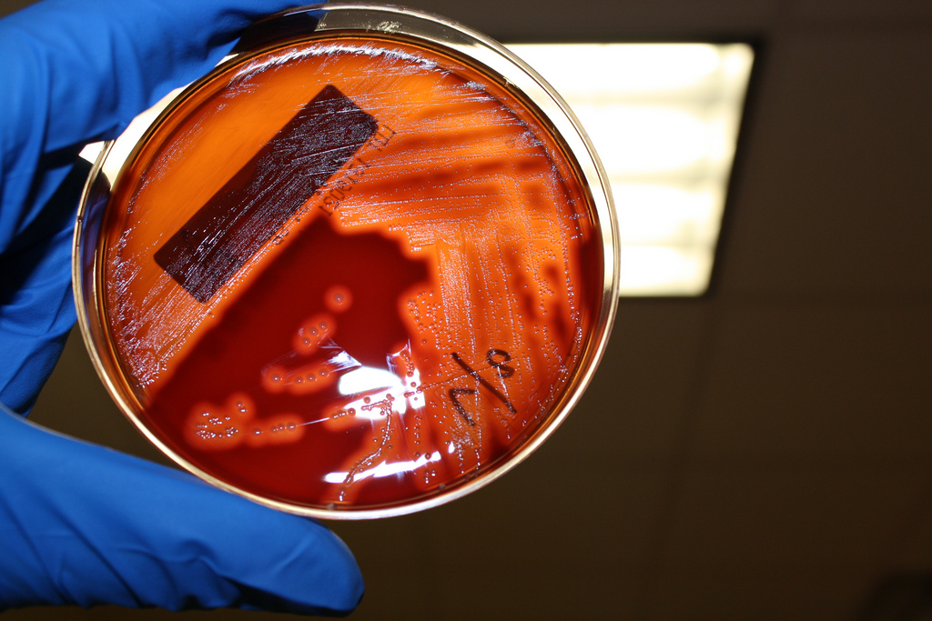 Cultivo en agar sangre de Streptococcus pyogenes (Grupo A de Lancefield)